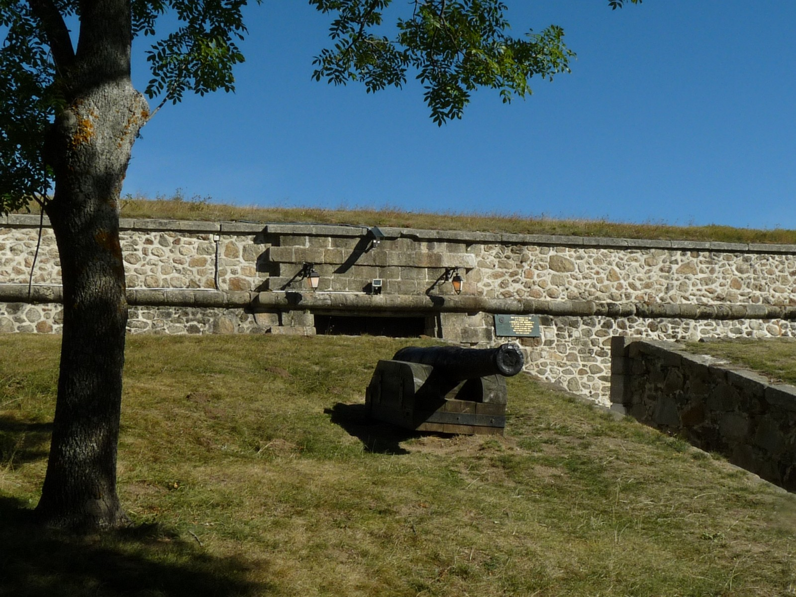 Glacis, fort militaire, Mont-Louis, Pyrénées-Orientales, France